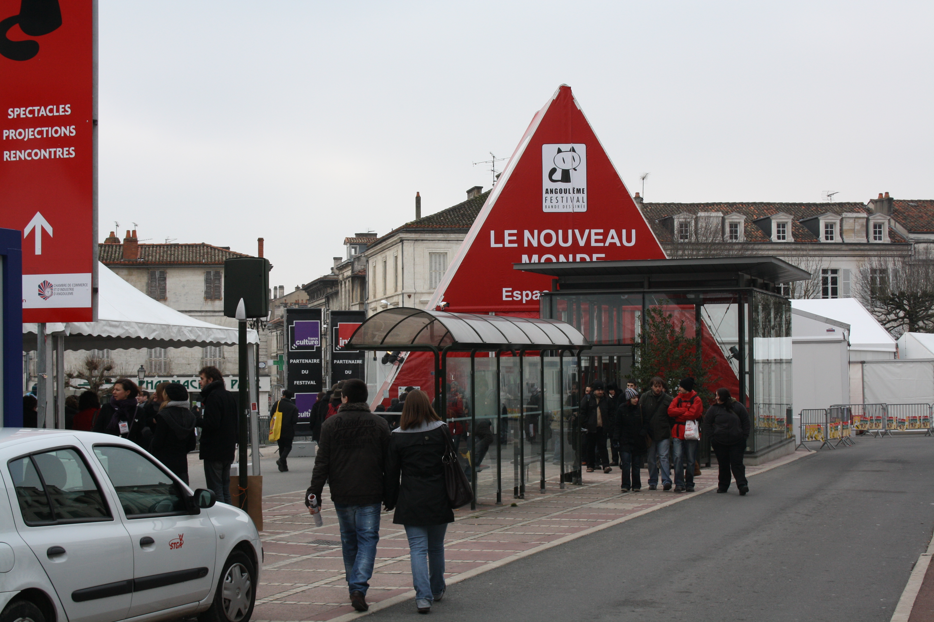 Entrée du Nouveau Monde au festival de la BD d'Angoulème